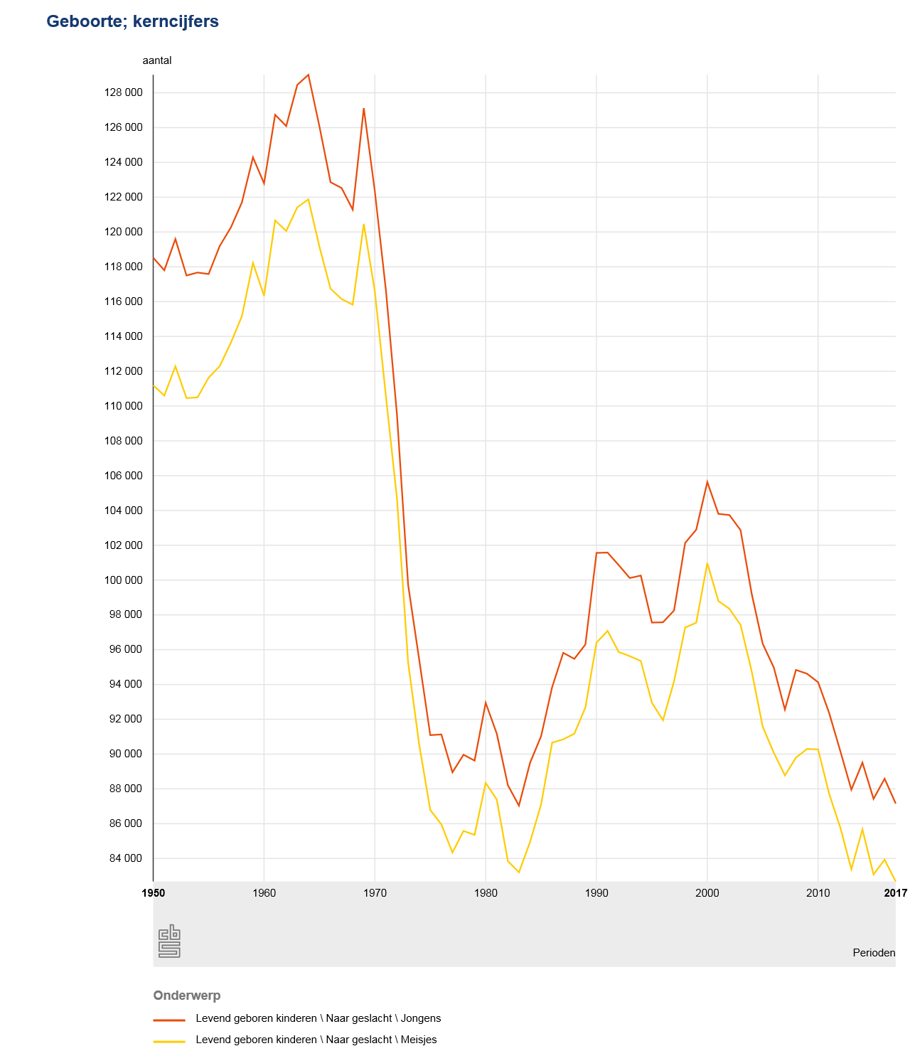 Geboorte; kerncijfers vanaf 1950 naar geslacht